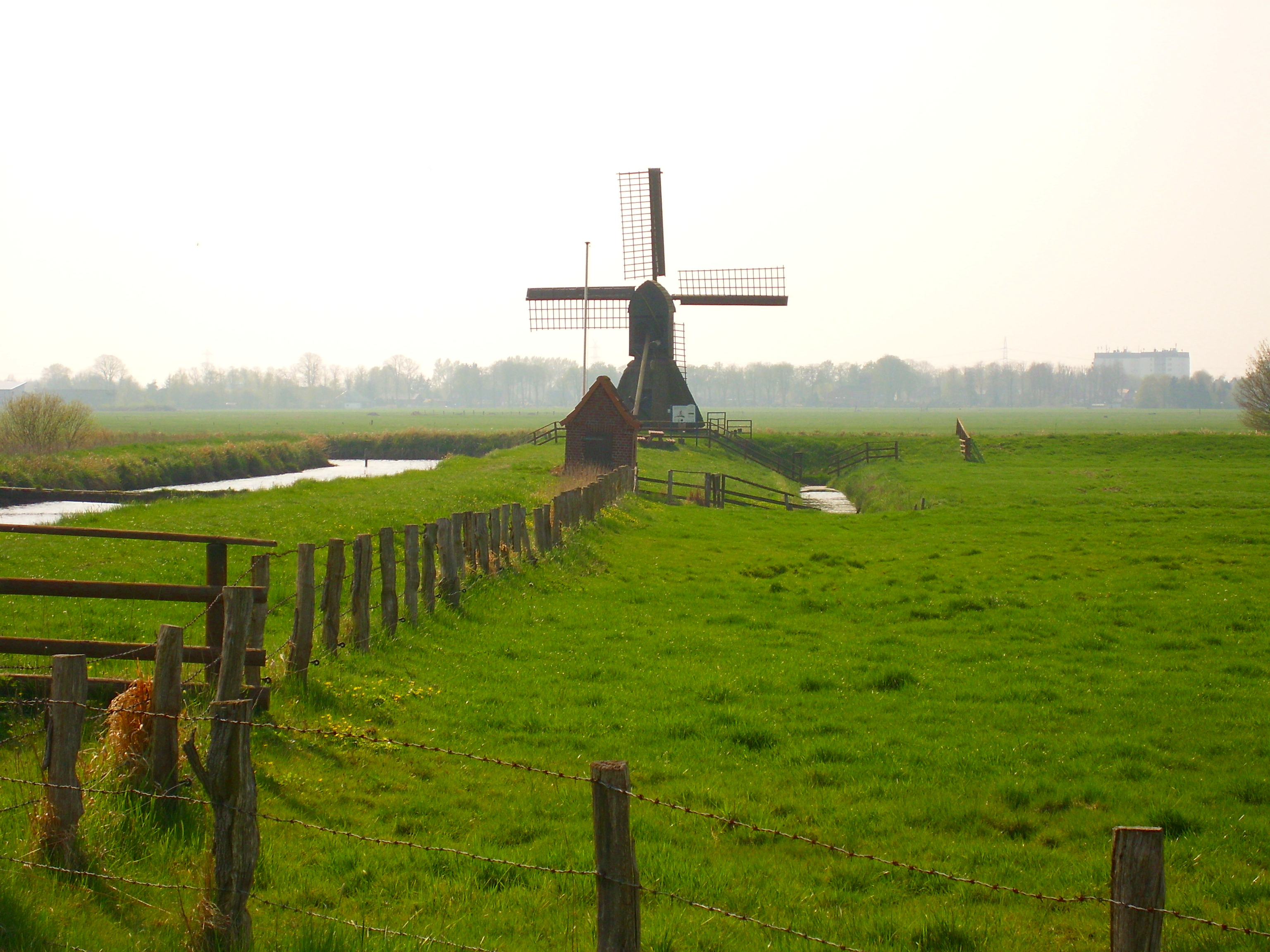 historische Schöpfmühle in Honigfleth bei Wilster. rechts der zu entwässernde Graben, links die Wettern.